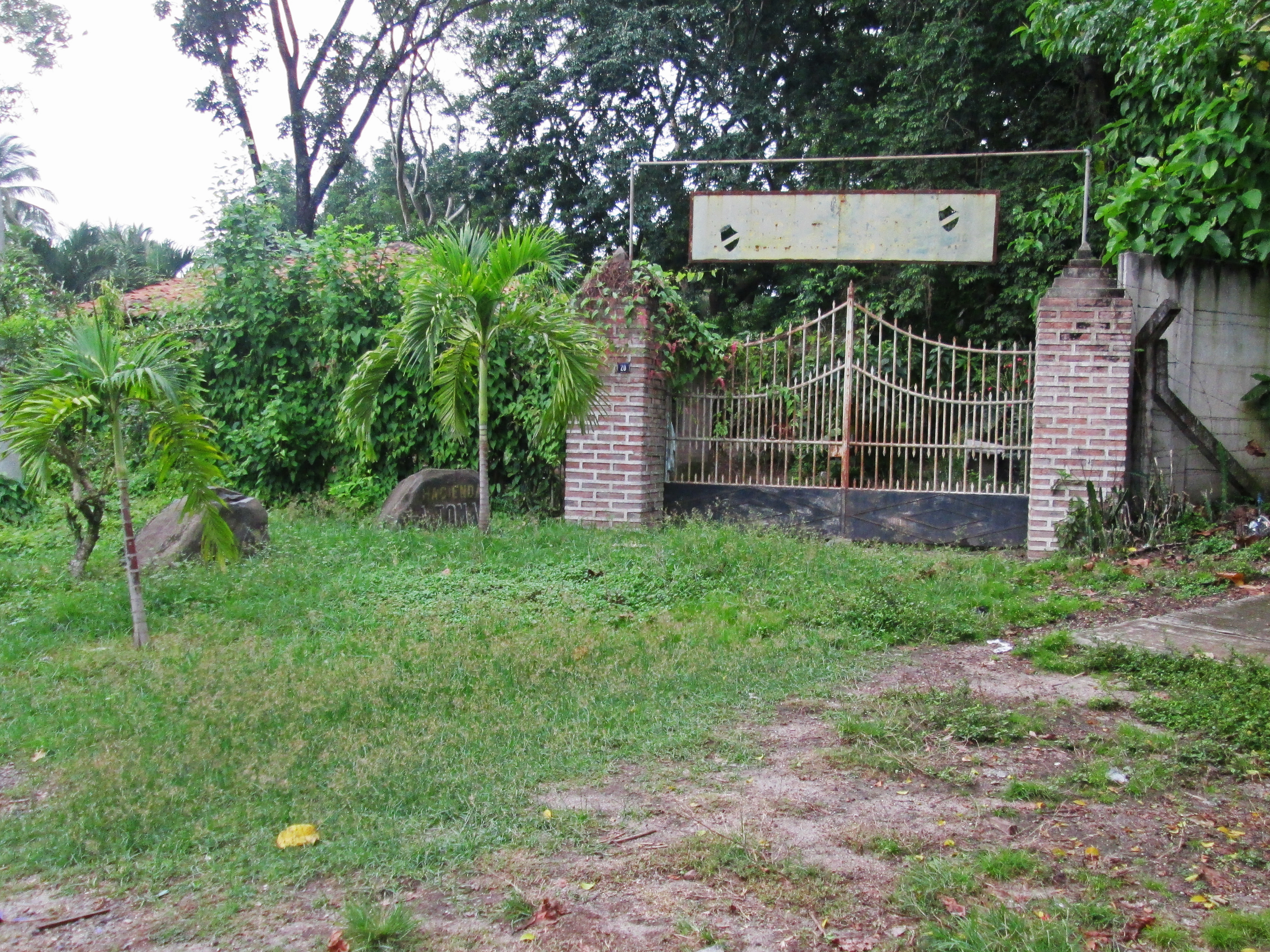 Principal entrada de la Hacienda la Toma